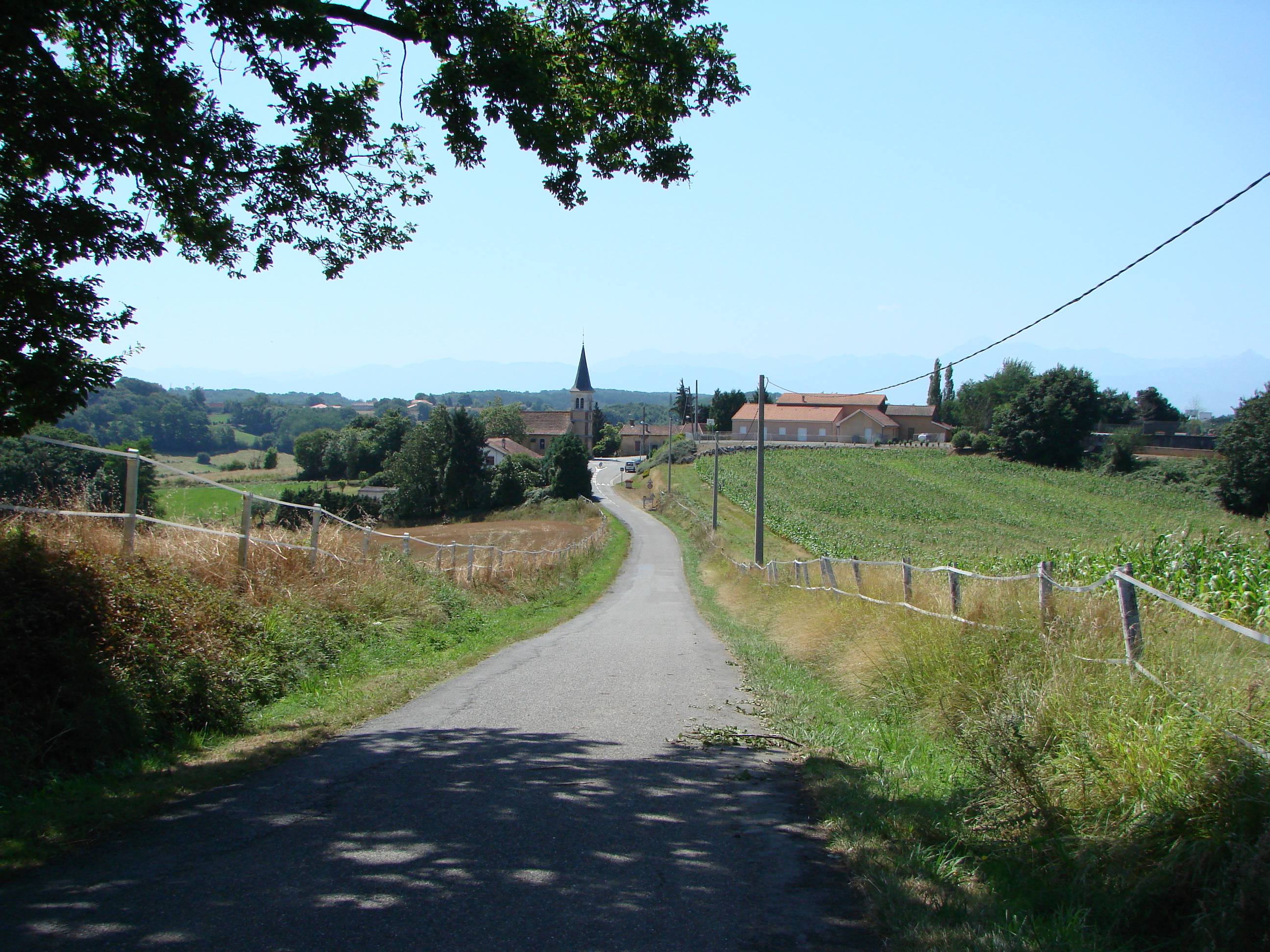 Vue du village de Oléac-Debat dans les Hautes-Pyrénées (France) : Entrée du village, église à gauche, école à droite